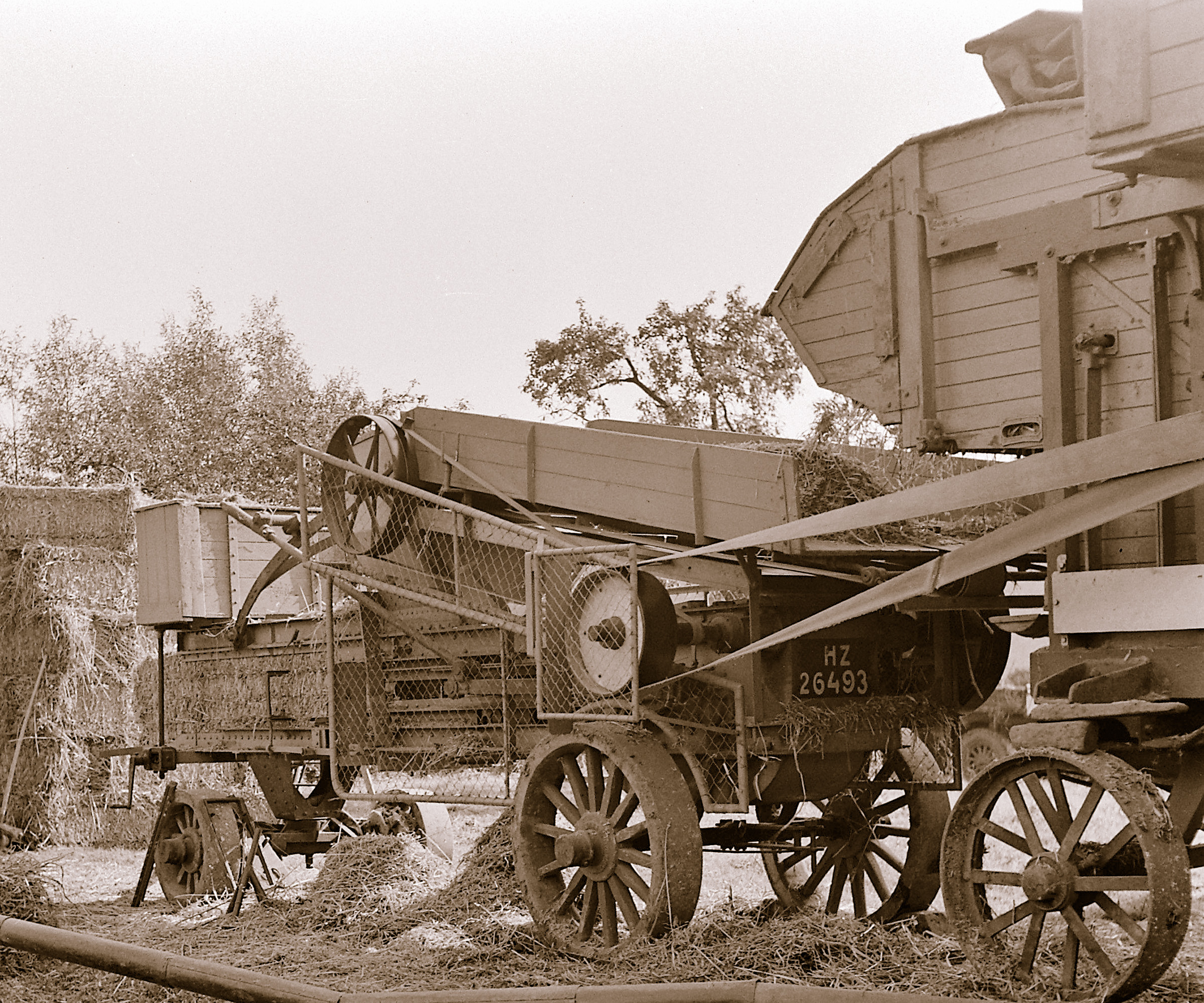 Collectie / Archief : Fotocollectie Arbeidsinspectie Reportage / Serie : [ onbekend ] Beschrijving : 6.1x6.2 Beveiliging van stropers door middel van schermen van buizen met gaas bespannen Datum : oktober 1951 Trefwoorden : beveiligingen, stropersen Fotograaf : [onbekend] Auteursrechthebbende : Nationaal Archief Materiaalsoort : Negatief (zwart/wit) Nummer archiefinventaris : bekijk toegang 2.24.03 Inventarisnummer : 2276 Bestanddeelnummer : 256-0855